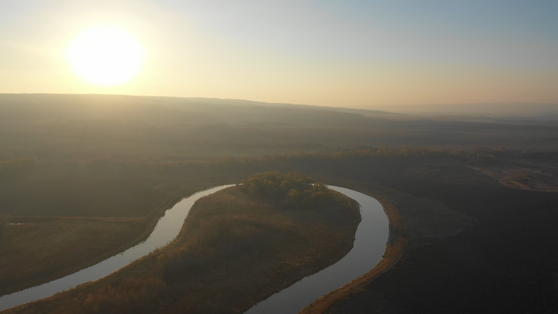 река